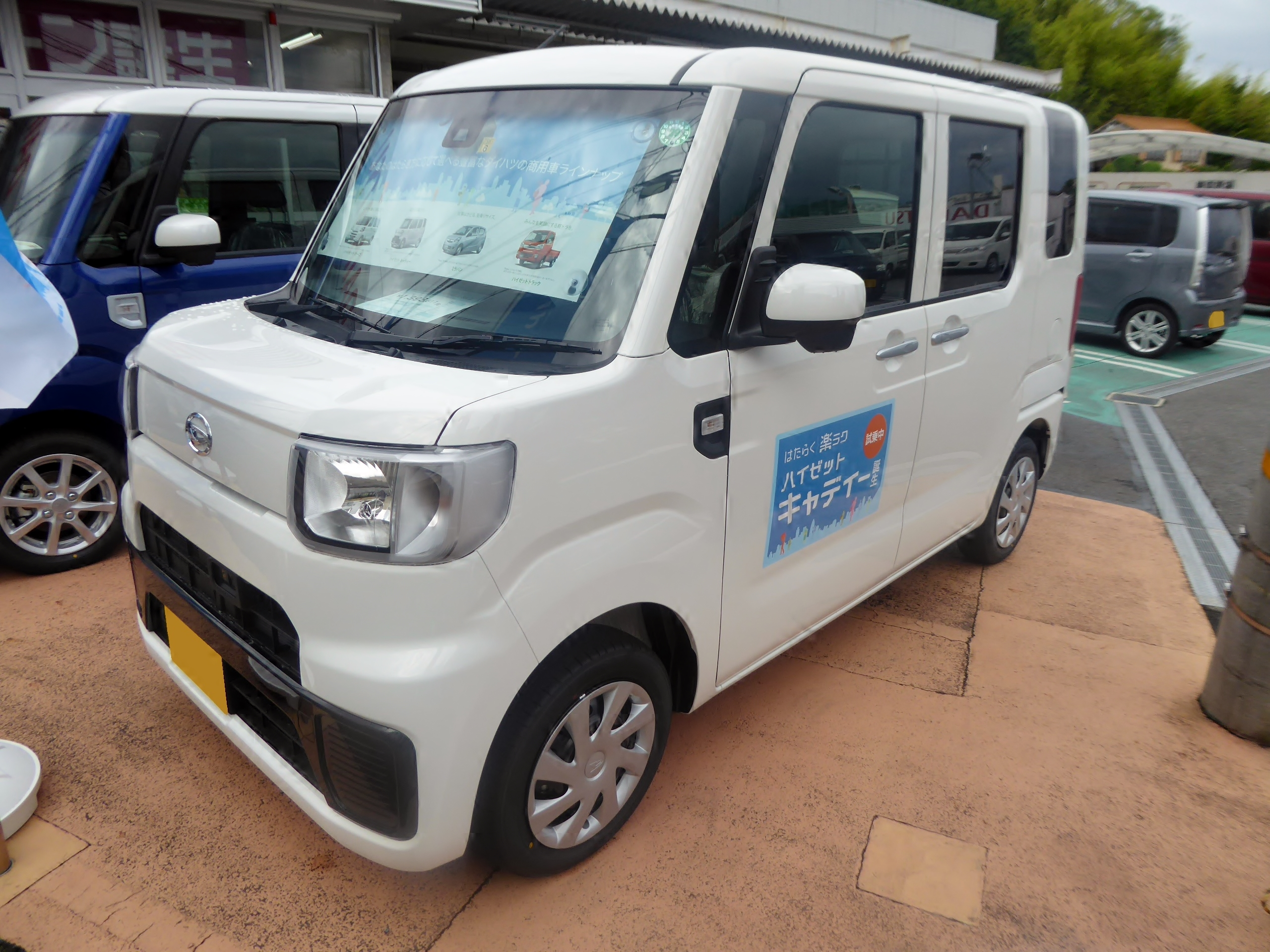 HBD-LA700V型ダイハツ・ハイゼットキャディーX”SA II"をフロントから撮影。